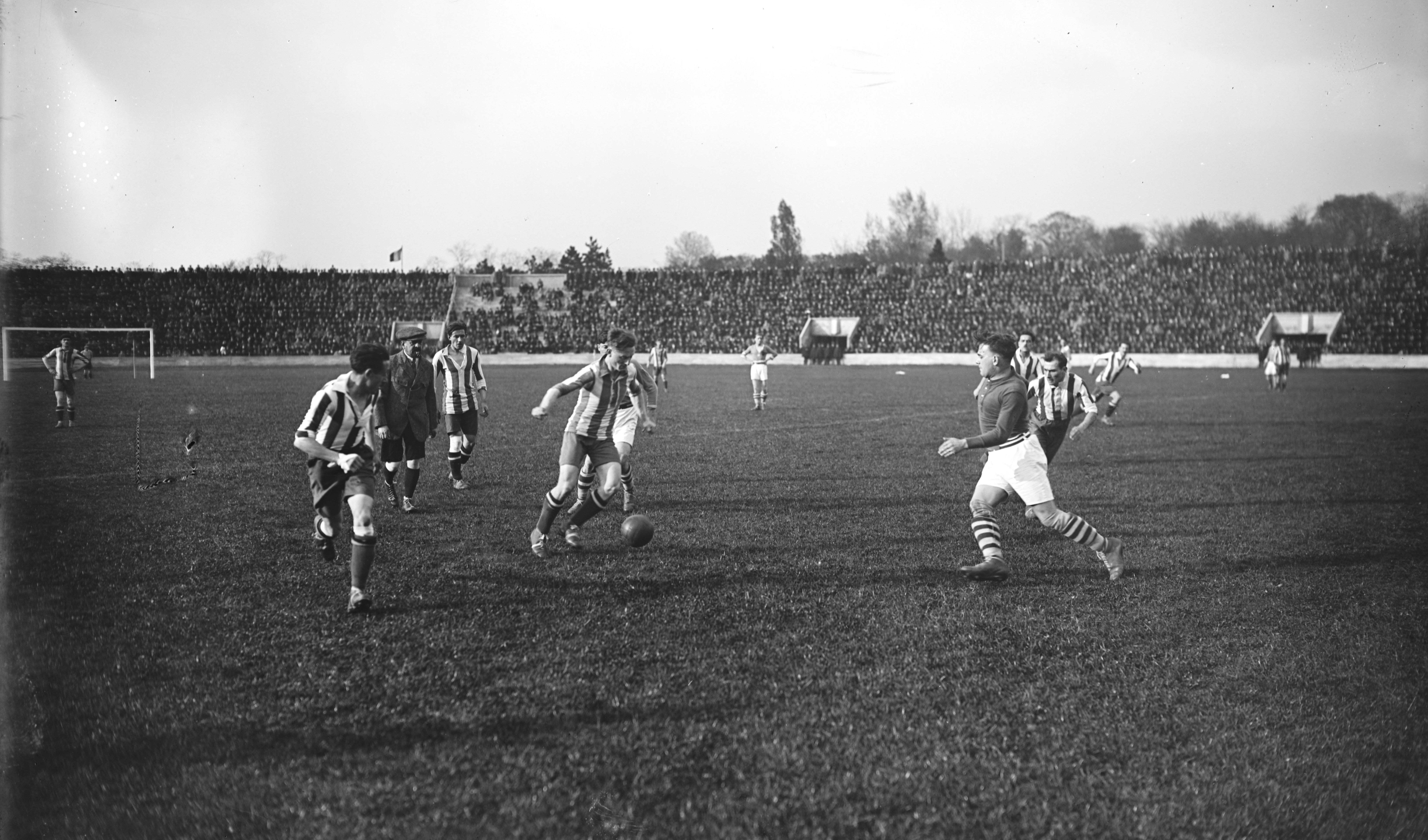 Match Red Star contre Olympique le 8 avril 1923 au stade Pershing pour la demi-finale de la Coupe de France.